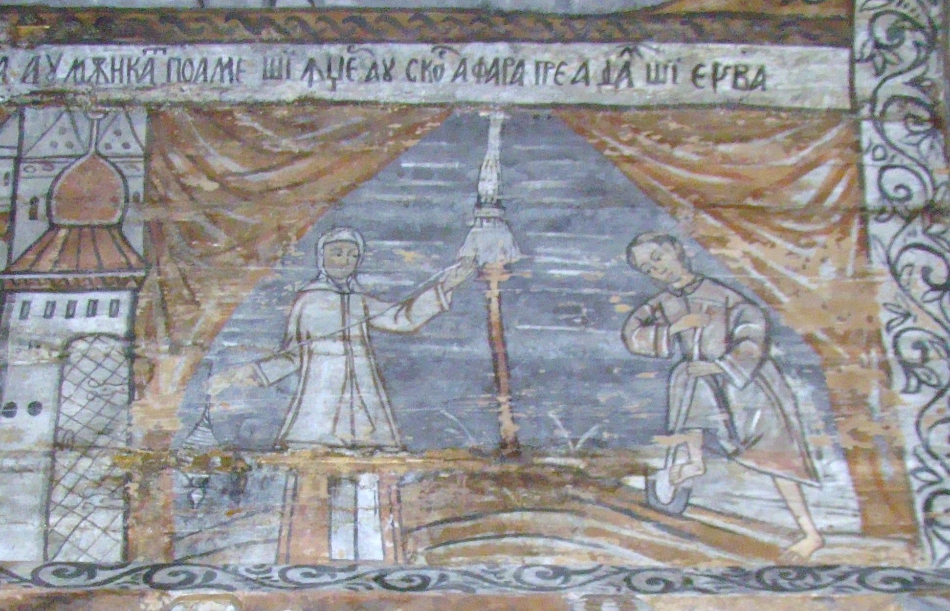 Biserica de lemn "Naşterea Maicii Domnului", sat IEUD